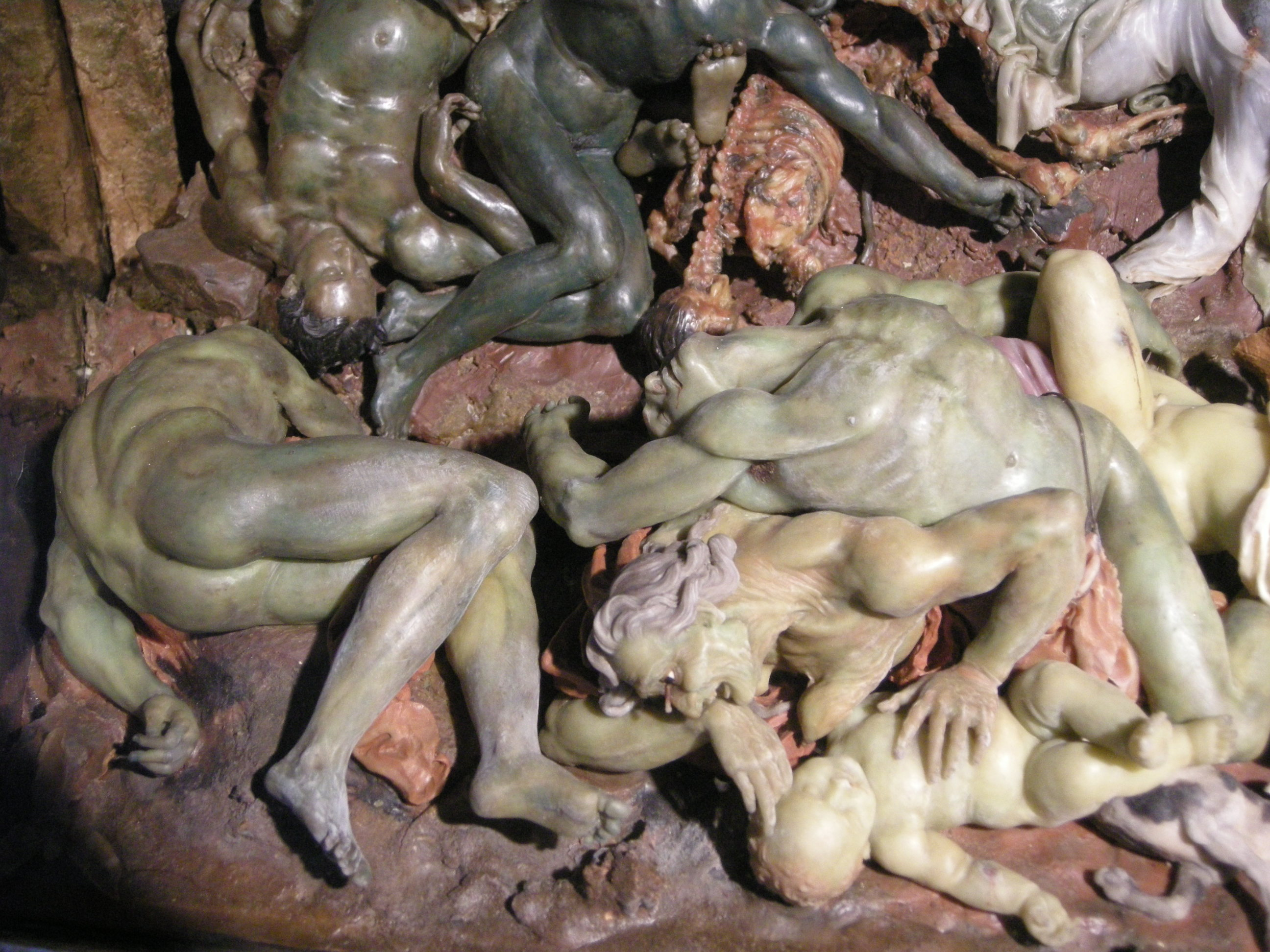 Gateano zumbo, la peste